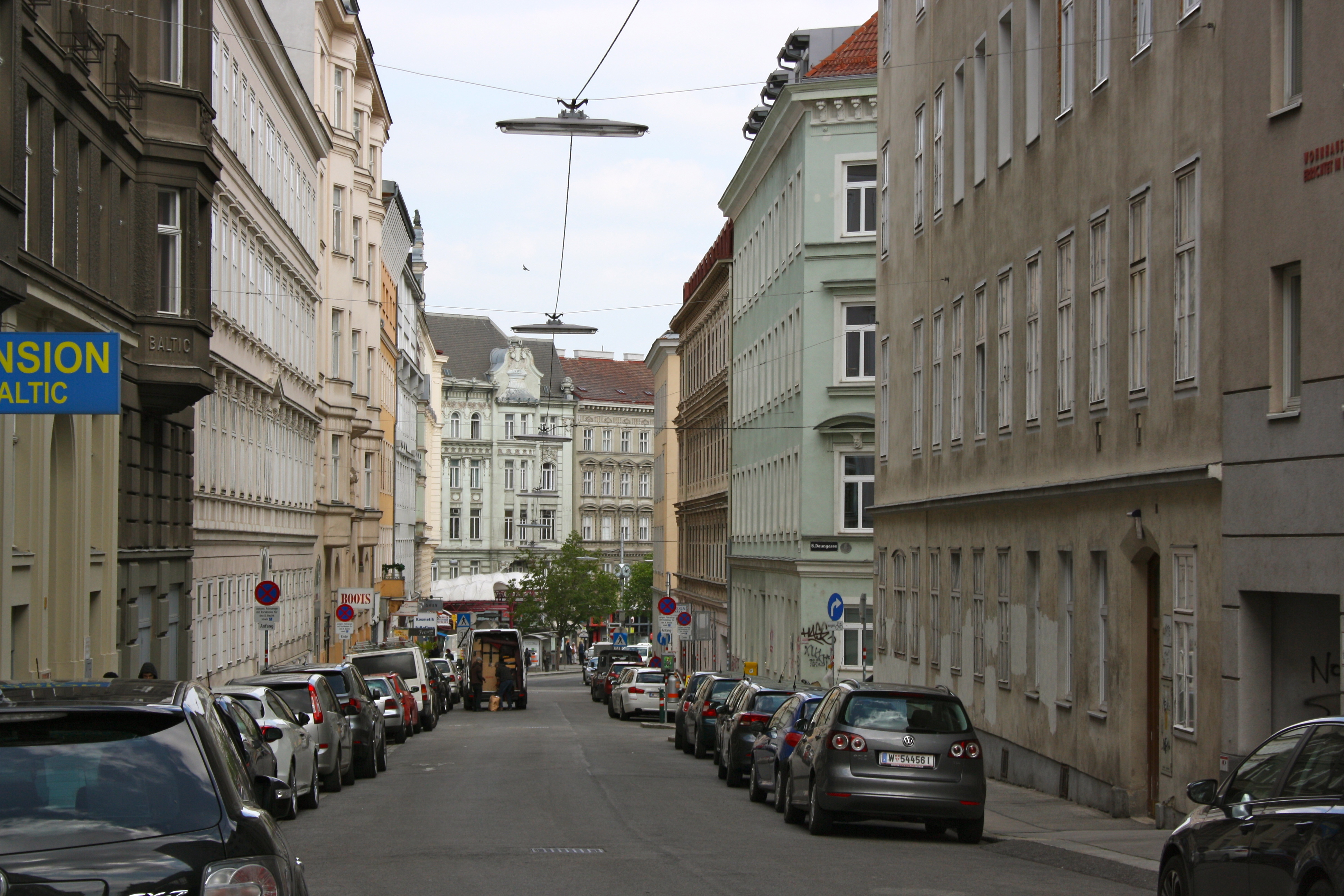 Skodagasse, Wien-Josefstadt.